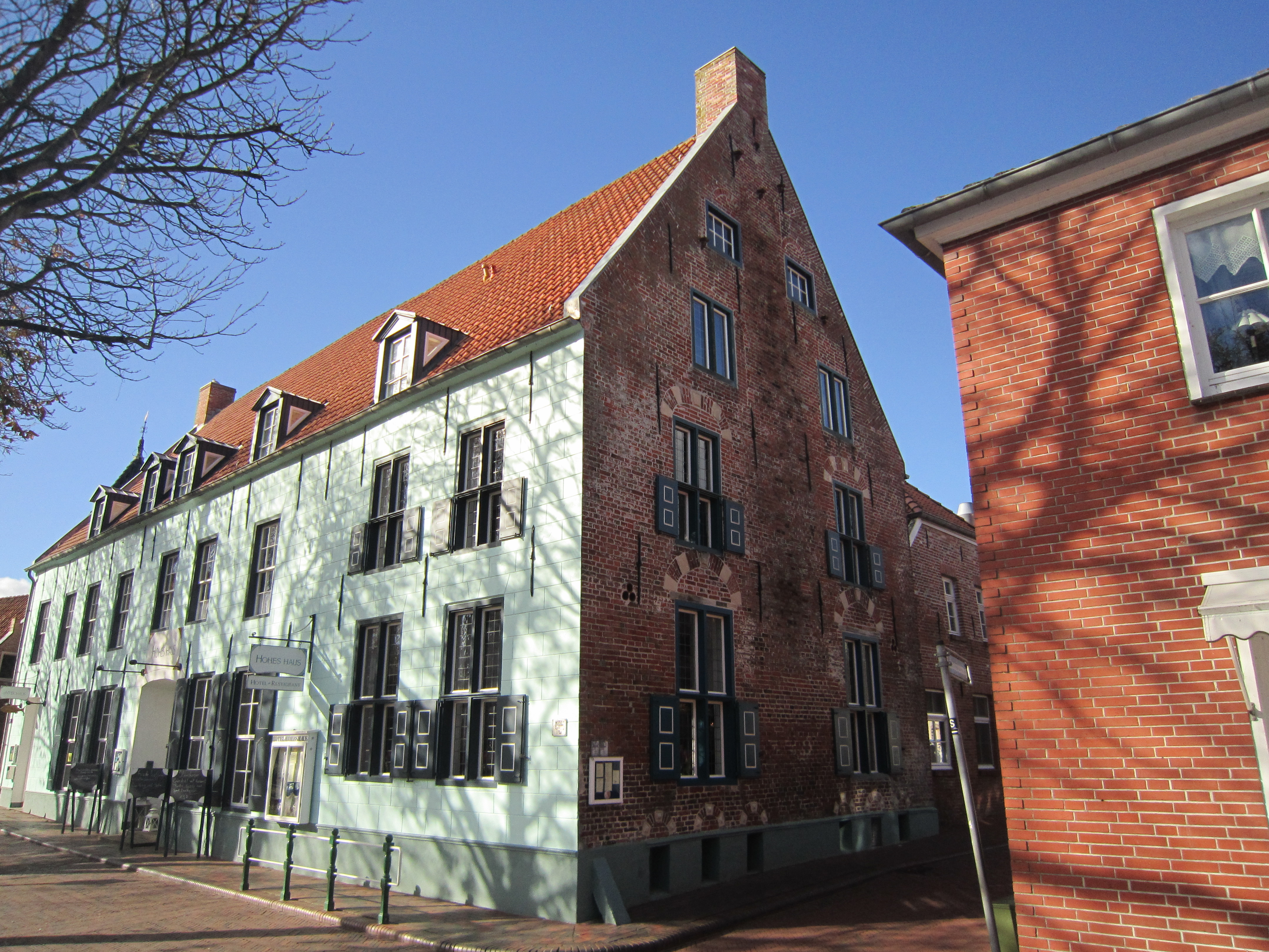 Greetsiel - Oost Friesland - Duitsland